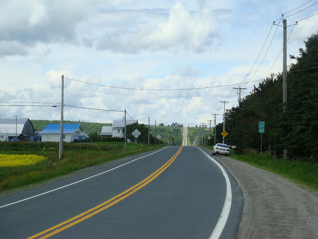 Photo de la route 281 près de Sainte-Camille-de-Lellis, Québec, Canada.